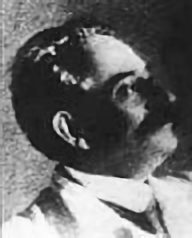 Bildnis des deutschen Pathologen Hugo Apolant; wahrscheinlich gegen Ende des 19. oder zu Anfang des 20. Jahrhunderts